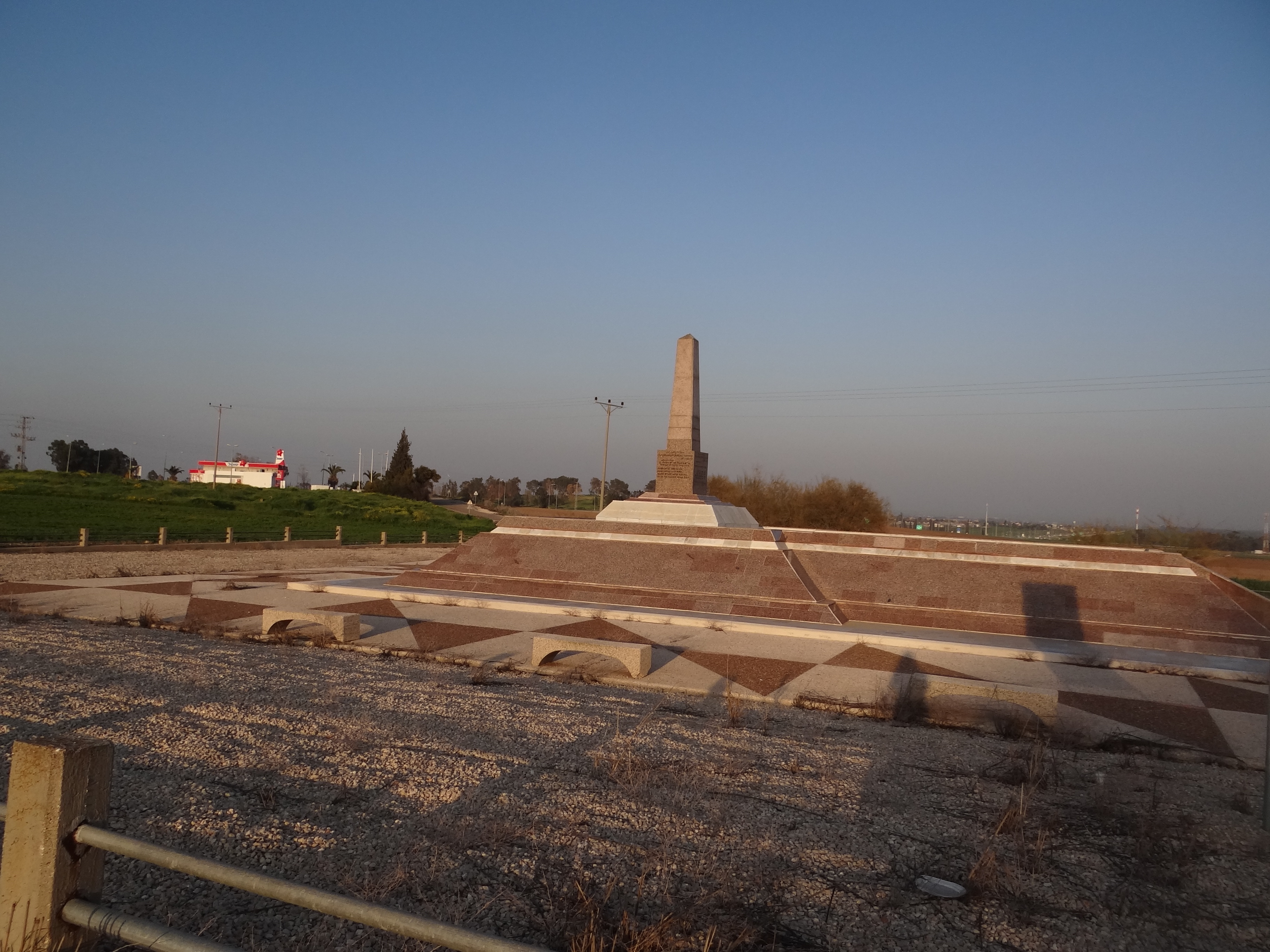 Monument to the memory of four Egyptian soldiers who fell in the battle of Al-Falouja in 1948 אנדרטה לזכר החייל המצרי שהוקמה ליד חמי יואב על כביש 35 מול מצודת יואב לזכר החיילים המצרים שנהרגו בקרב ליד אל פלוג'ה בשנת 1948.